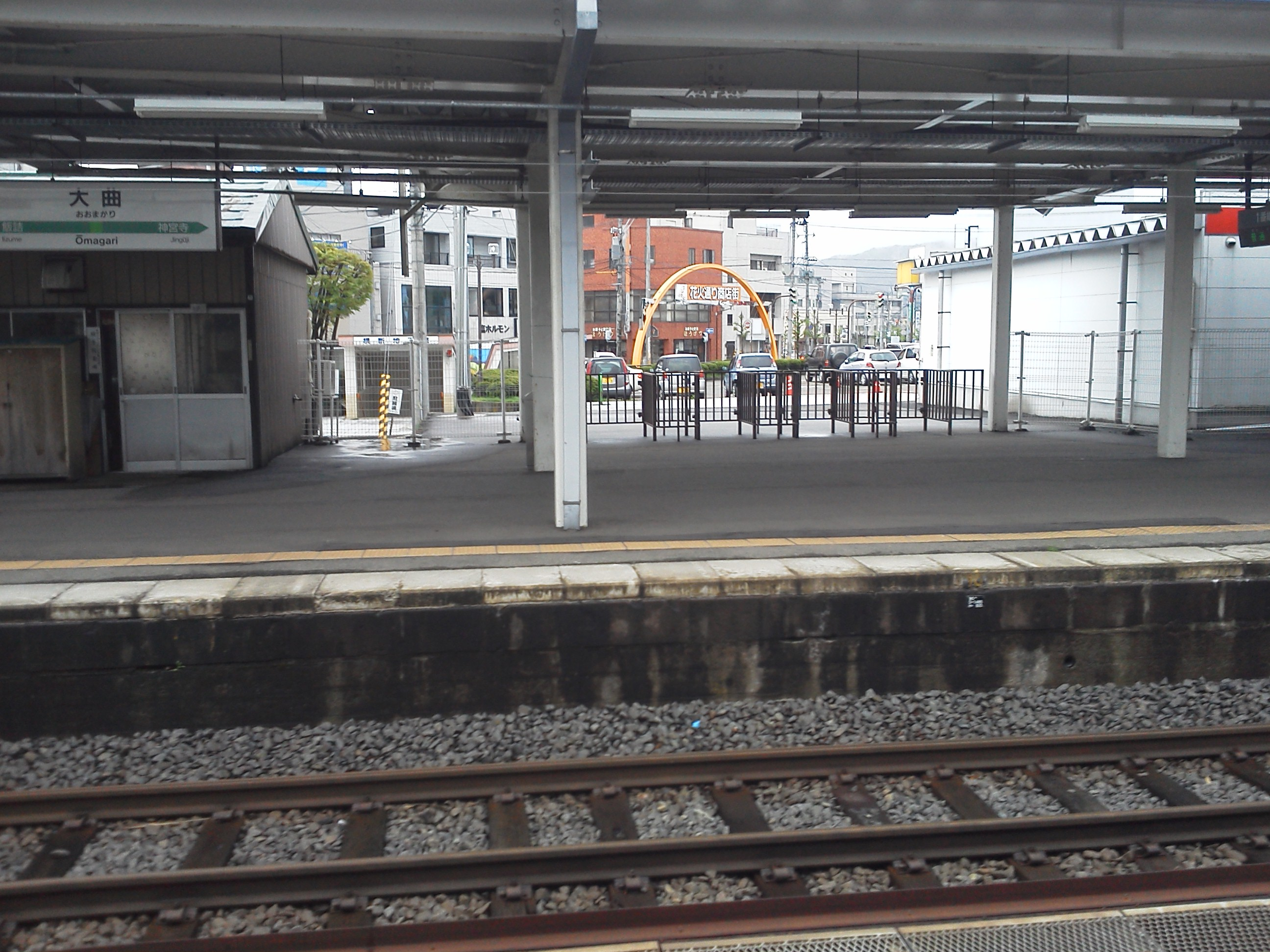 JR東日本・大曲駅2番線ホーム（新幹線乗換改札口前付近）から、1番線ホームと西口広場を望む。投稿者自身による撮影（Marinesnow5 (talk)'s file）。撮影日：2012-05-05)